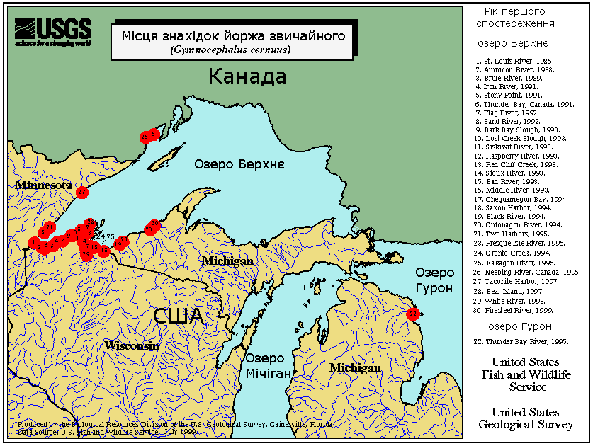 Ruffe map Greate Lakes.gif: Розповсюдження йоржа звичайного у Північній Америці